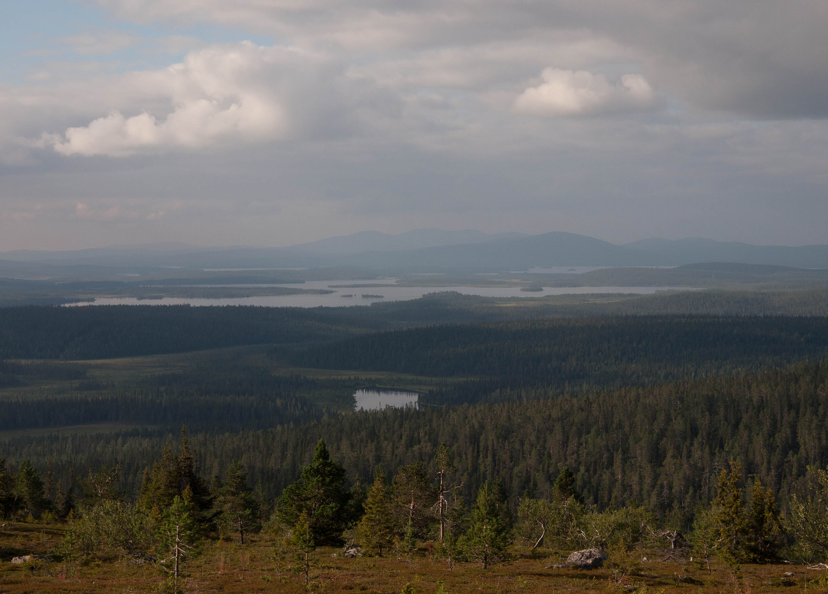 Pallas fells from Äkäskero fell